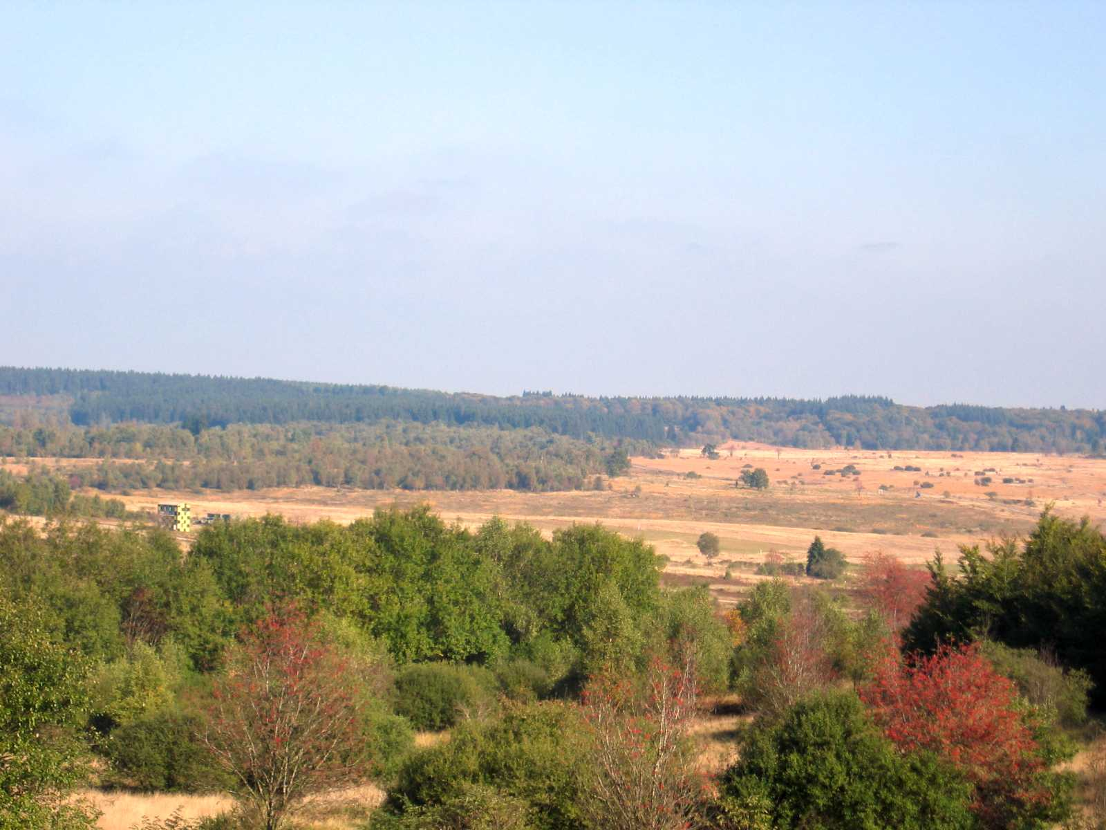 Teilansicht des Nato Übungsplatzes Elsenborn